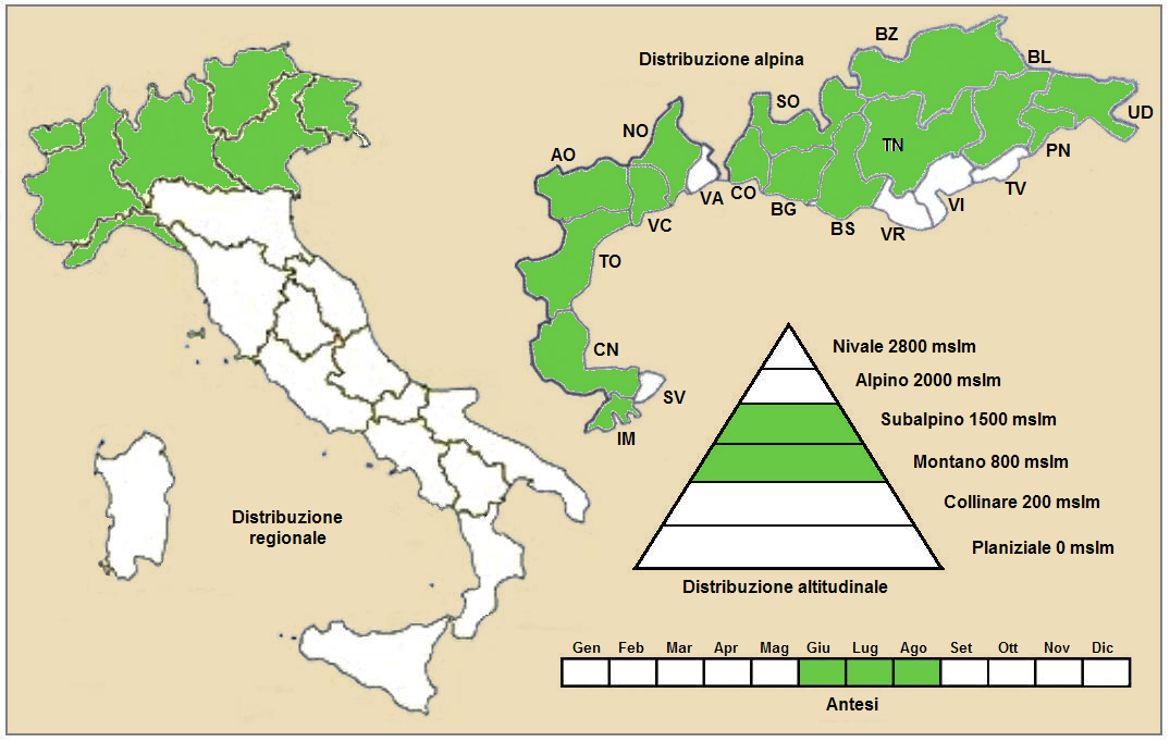 Thalictrum foetidum - Distribuzione